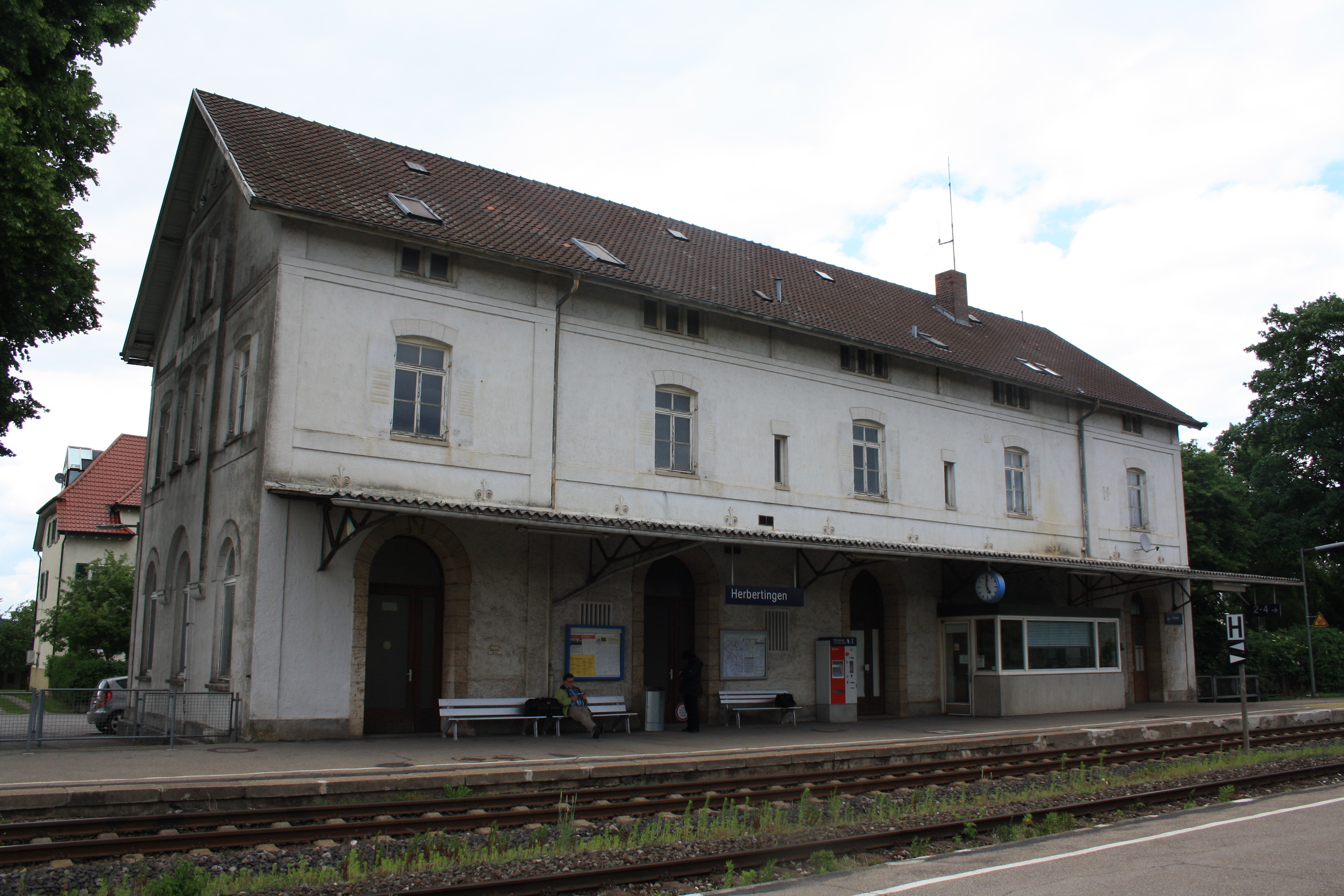 Bahnhofsgebäude und Hausbahnsteig (Gleis 1) von Herbertingen an der Bahnstrecke Württembergischen Donautalbahn. Zudem bildet der Bahnhof den Ausgangspunkt der historischen Württemberischen Allgäubahn, heute wird der Abschnitt als Bahnstrecke Herbertingen–Aulendorf bezeichnet. Der Bahnhof verfügt über 4 Gleise, die an einem Hausbahnsteig (im Bild), einem Mittelbahnsteig (Gleise 2 und 3) sowie an einem Zwischenbahnsteig (Gleis 4) liegen und nur durch überschreiten der Gleise mittels eines Reisendenüberwegs erreicht werden können. Planmäßig befahren werden jedoch nur die Gleise 1-3.